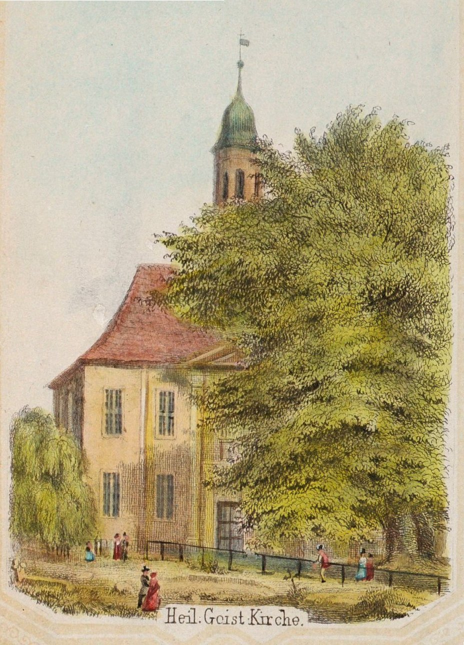 Heiliggeistkirche Altona 1848